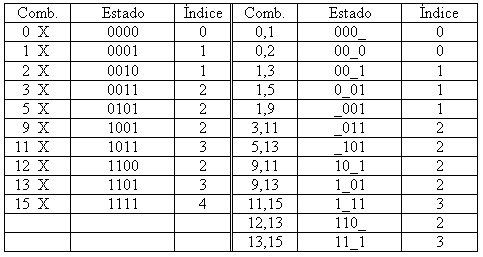 Tabla ejemplo de simplificación numérica